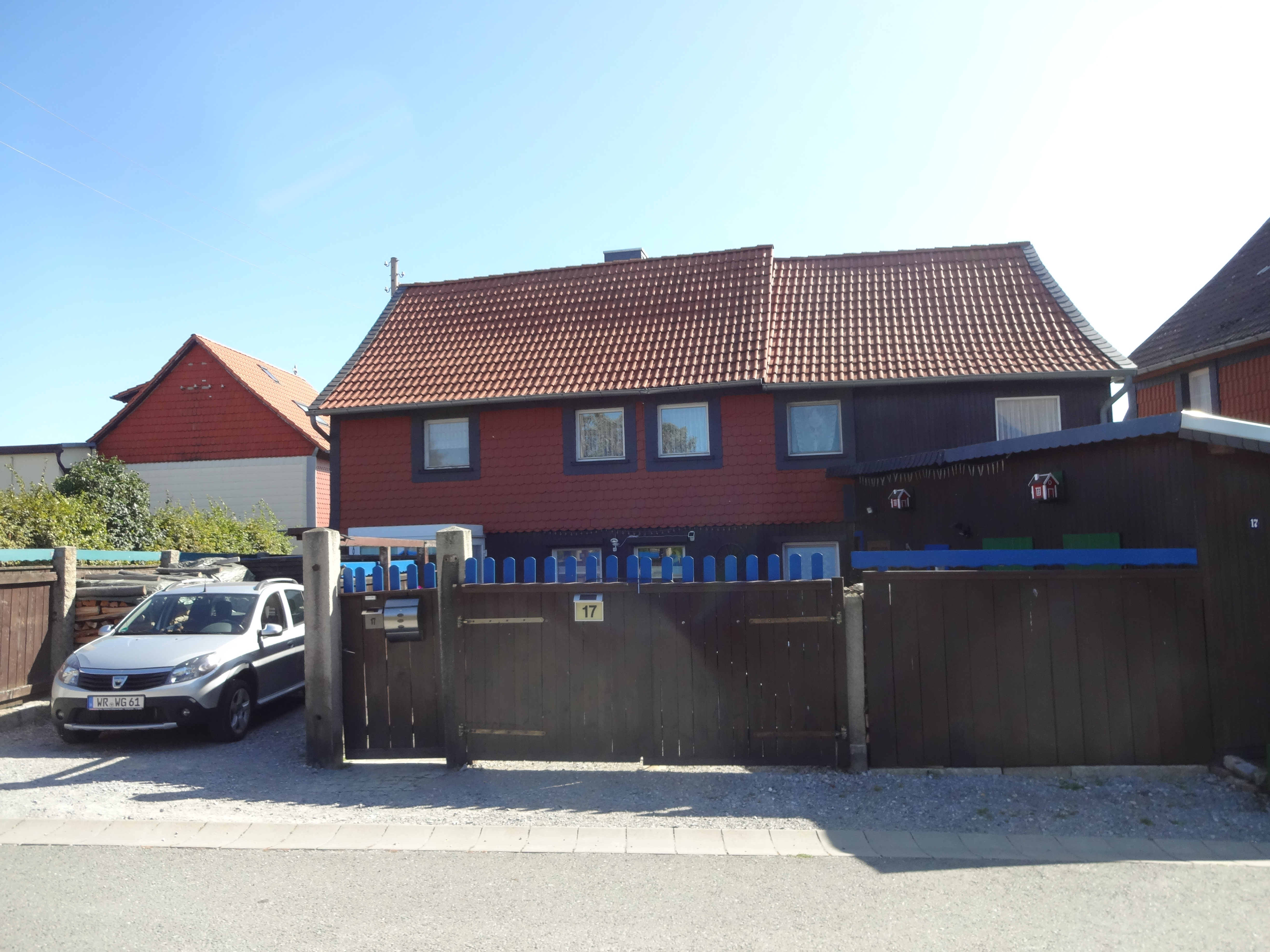 ehemals denkmalgeschütztes Wohnhaus in der Straße Osterbrink 17 in Drübeck